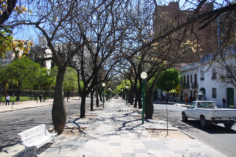 Boulevard Chacabuco, Córdoba, Argentina